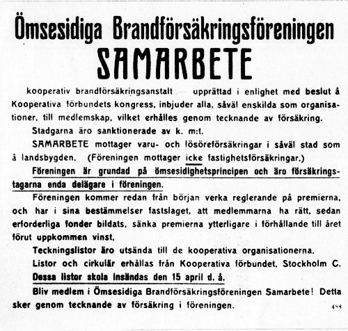 Samarbete. Upprop